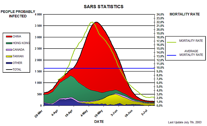 SARS-Statistik.